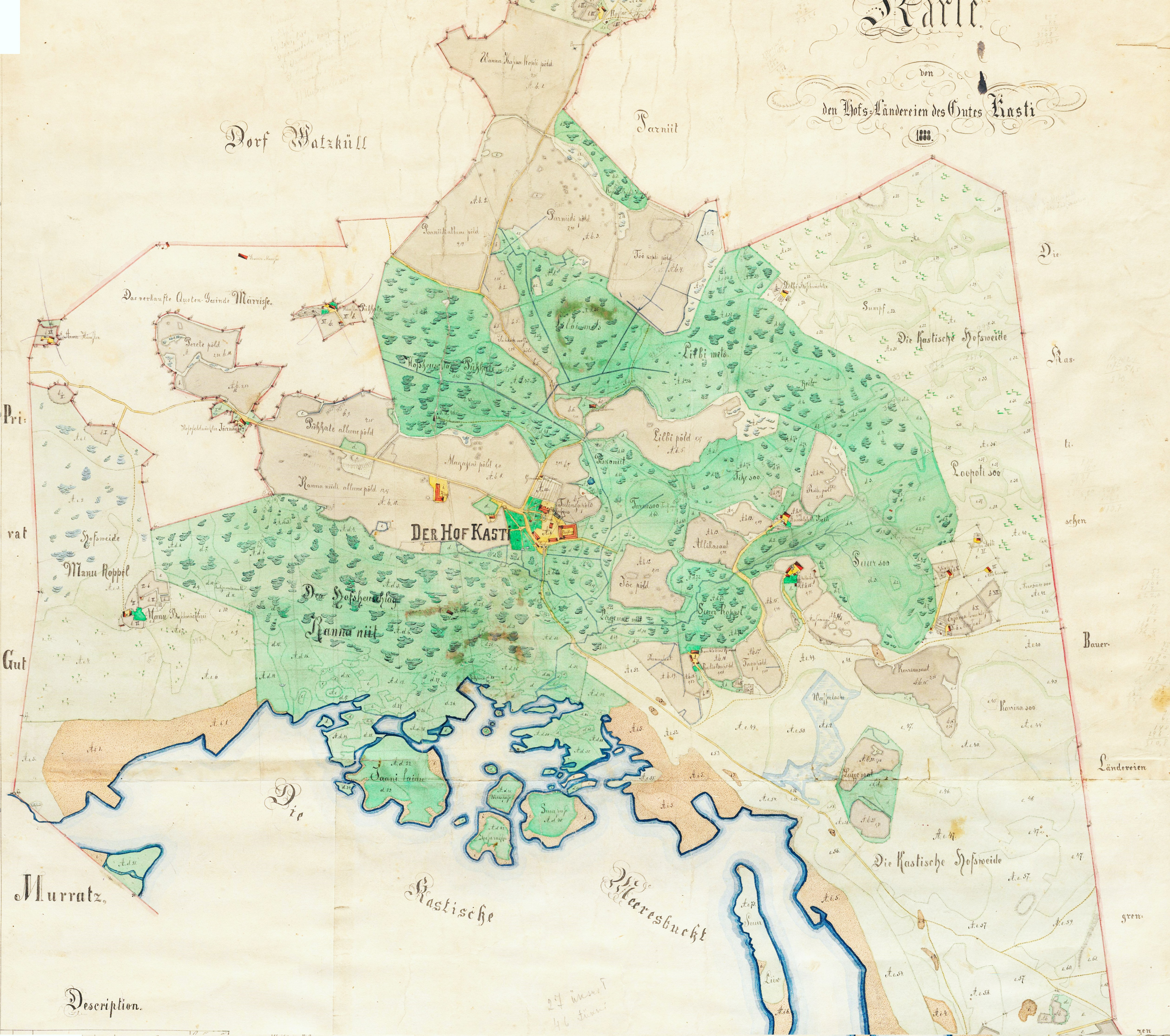 Allikmaterjalist taastanud ja redigeerinud Tiit Tilk.